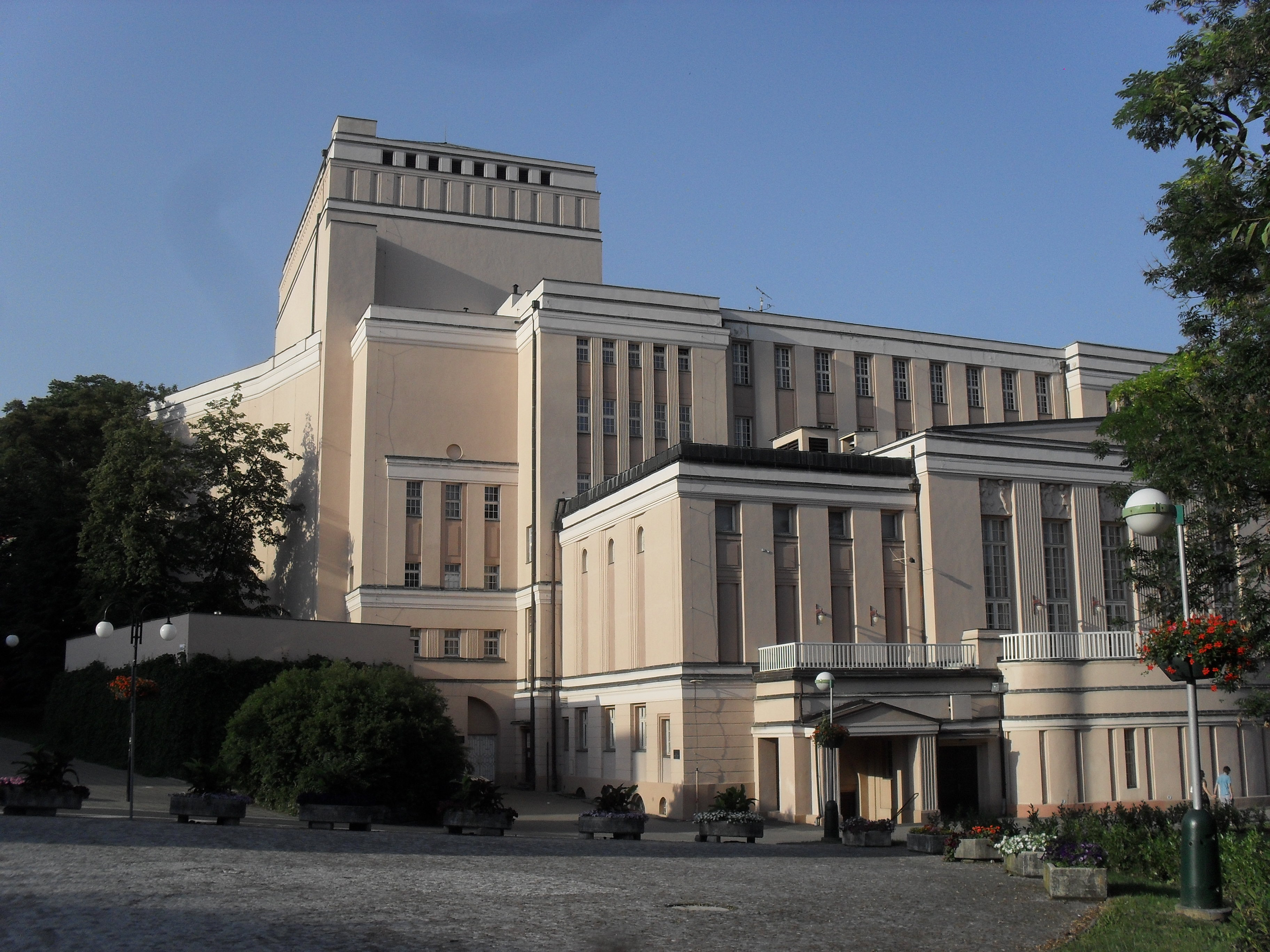 Zadní trakt Krušnohorského divadla, Teplice.